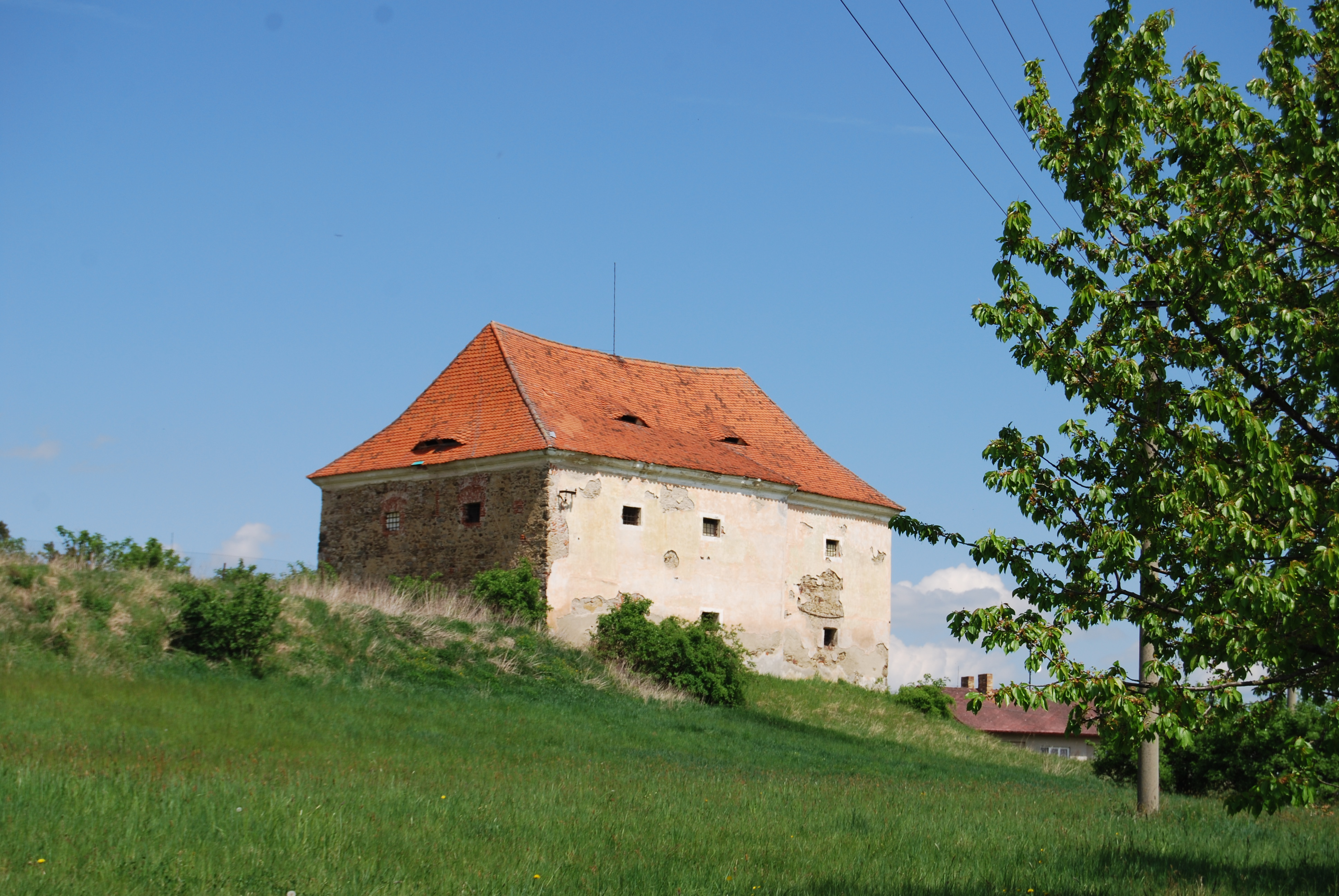 Tvrz. Pohled z komunikace na Žabrakov. Obec Lipovice se nachází v okrese Prachatice, kraj Jihočeský. Česká republika.